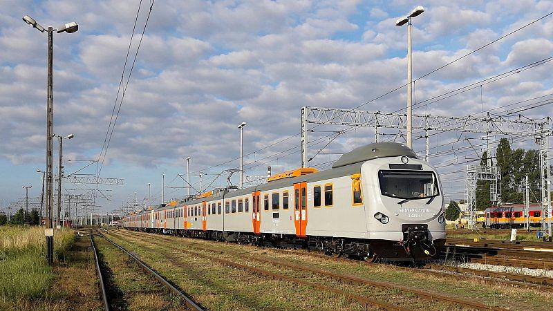 Zmodernizowane elektryczne zespoły trakcyjne EN57FPS-1711 i 1625 stoją na bocznicy stacji Poznań Główny i oczekują na przekazanie do eksploatacji w Przewozach Regionalnych.